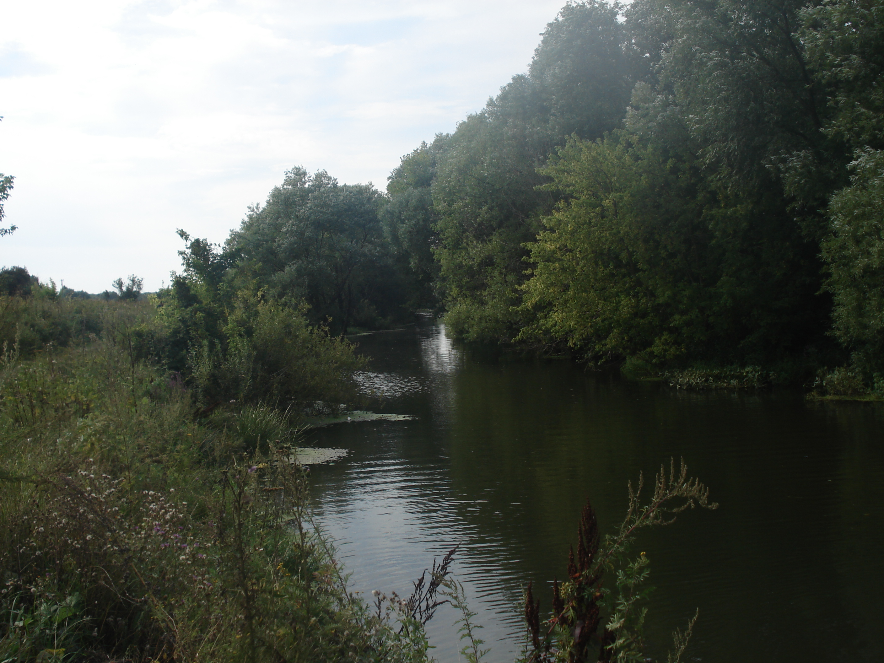 Река Ведуга у города Семилуки